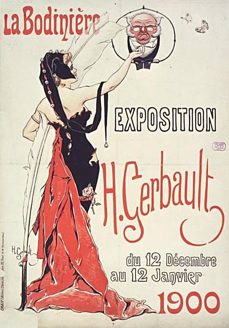 La Bodinière, exposition H. Gerbault : du 12 décembre au 12 janvier 1900 : affiche